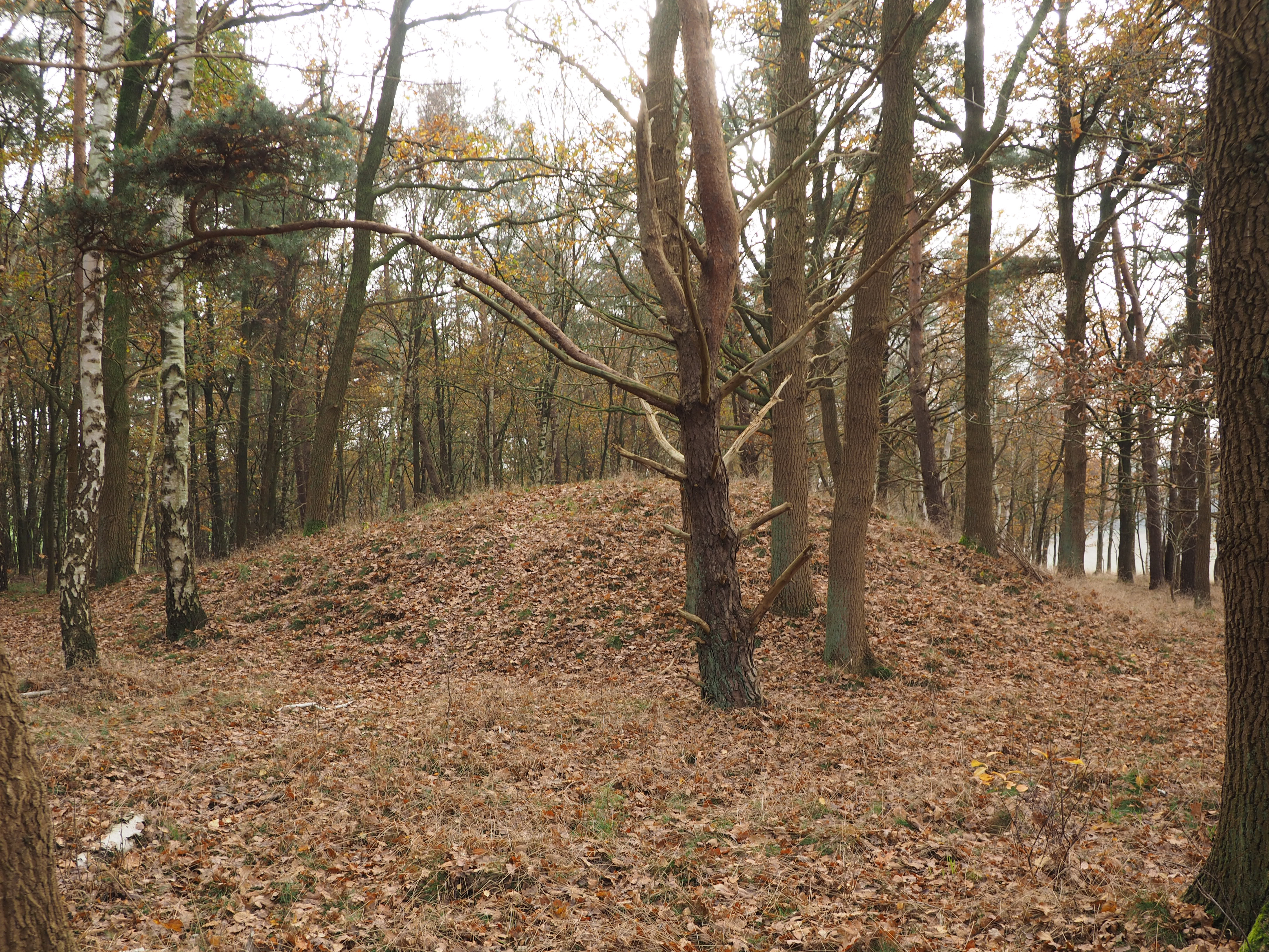 Eines der fünf noch vorhandenen Hügelgräber des Gräberfeldes von Bonstorf